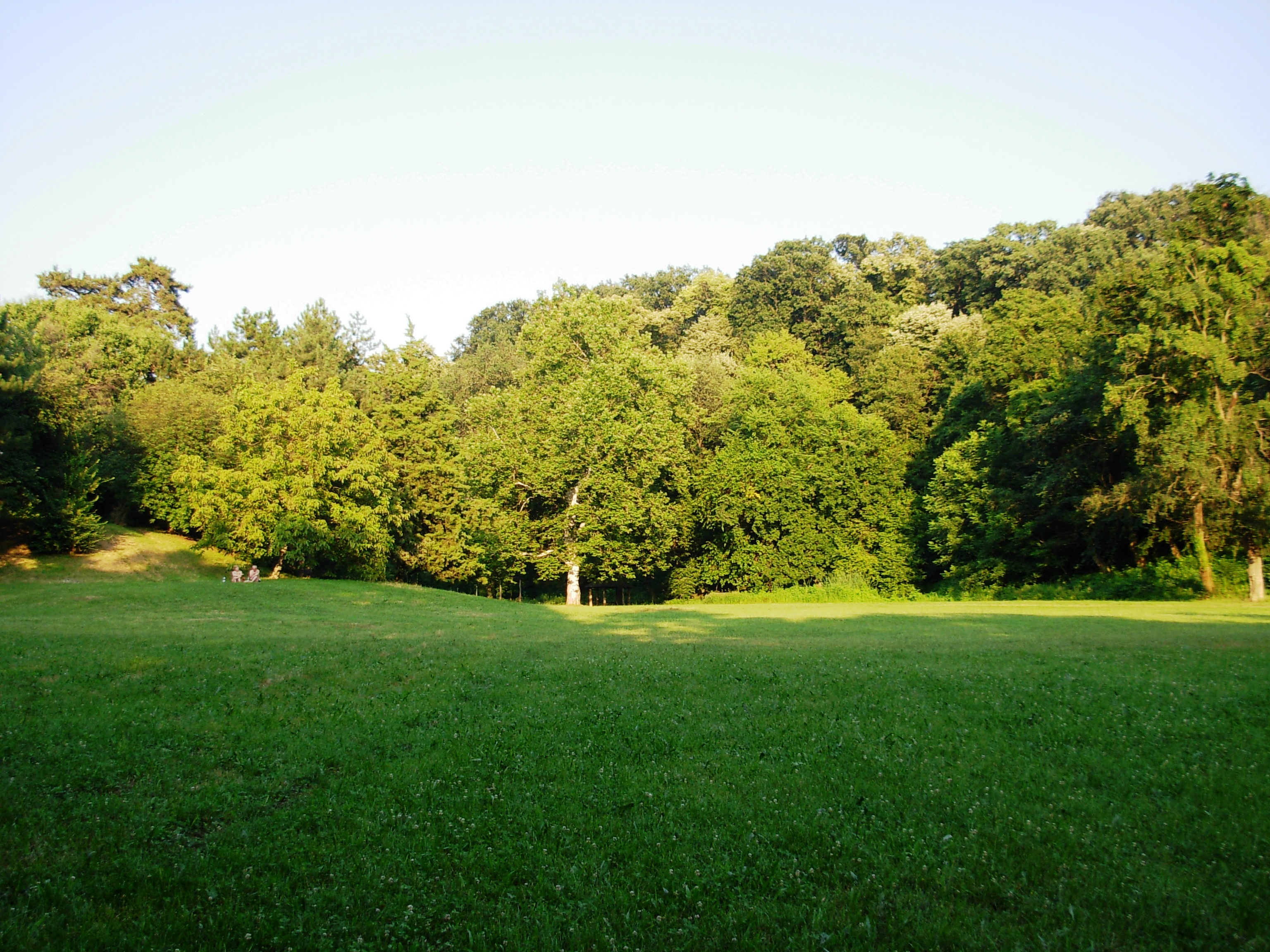 Kamenički park.